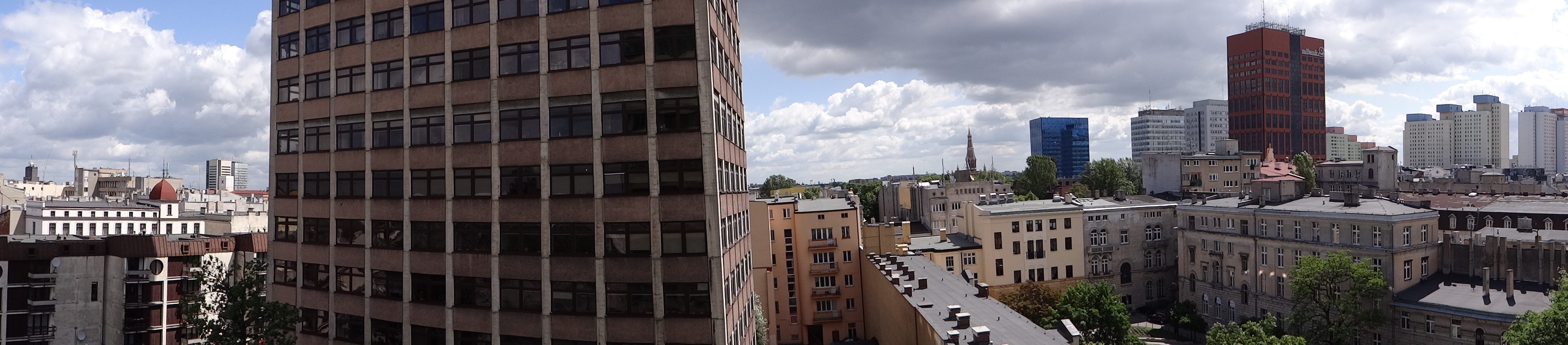 Panorama wykonana z okna hotelu Światowit (5. piętro)